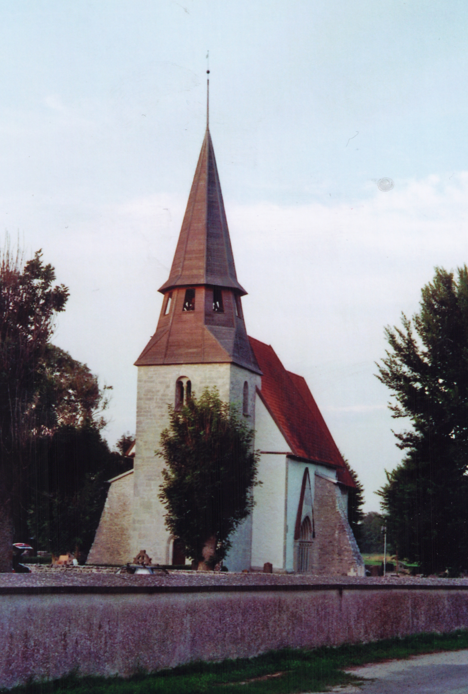 Kirche von Vänge (Gotland)